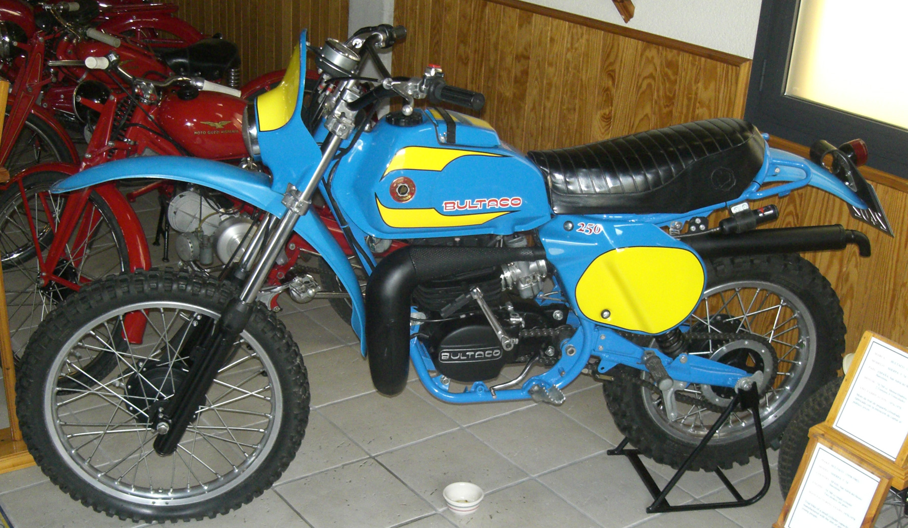 Bultaco Frontera MK II 250 ccm, aufgenommen im Museo Vehiculo Historico Vall de Guadelest